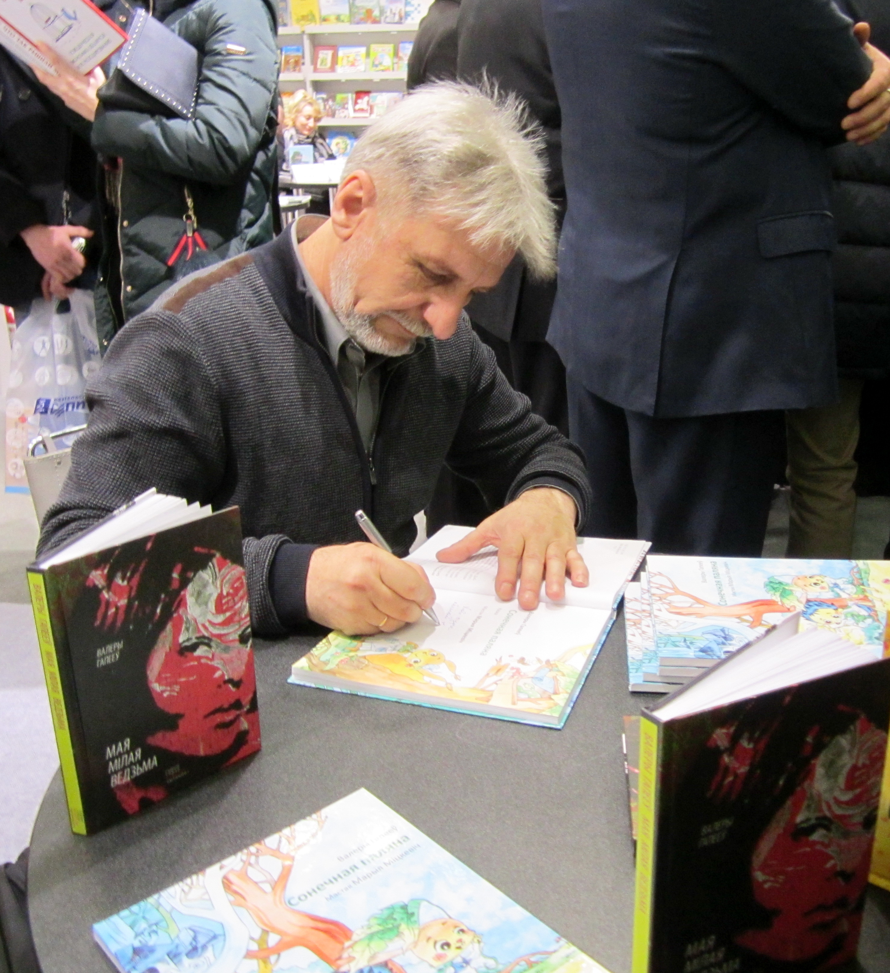 Валерый Гапееў на ХХV Мінскай кніжнай выстаўцы-кірмашы. Раздача аўтографаў